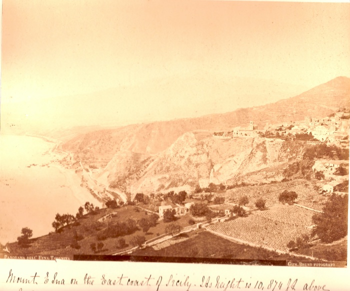 Taormina - "Panorama del monte Etna da Taormina", verso il 1865 circa. Foto di Giuseppe Bruno.